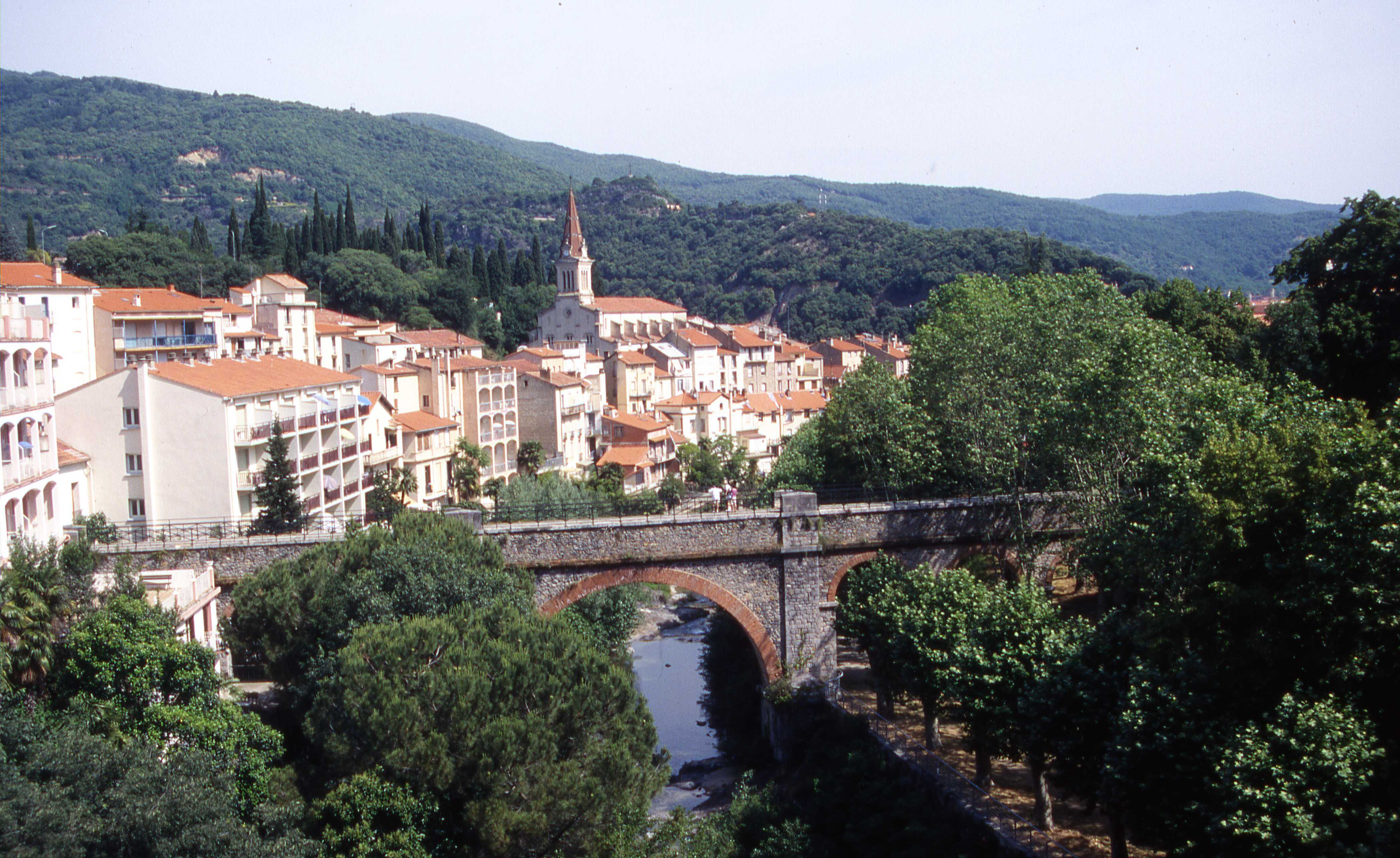 Vue générale d'Amélie-les-Bains depuis les thermes. Amélie-les-Bains-Palalda, Pyrénées-Orientales, France.